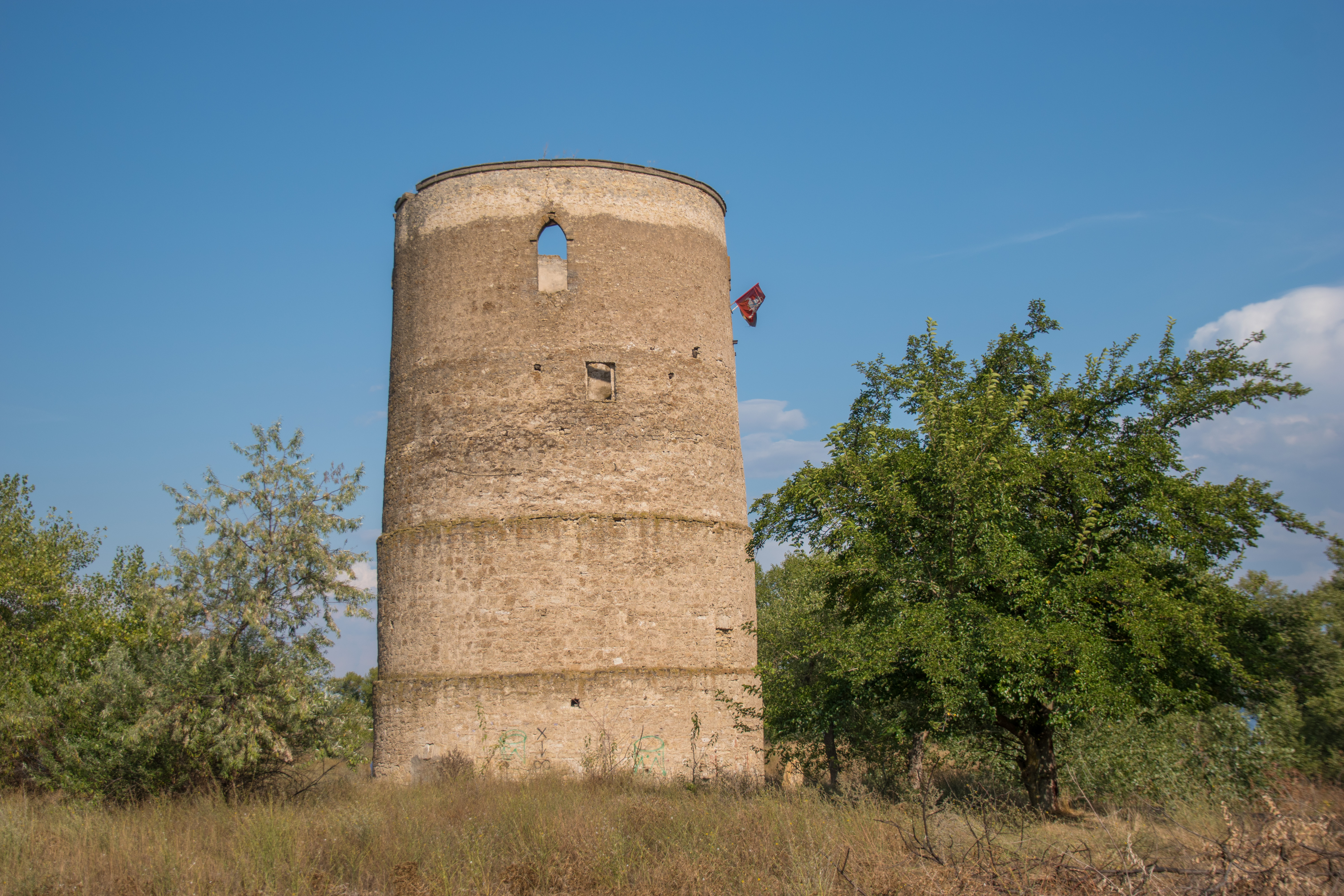 Дозорна башта часiв князя Вiтовта Великого, Литовського князивства, Веселе, вул. Свиридова, 6